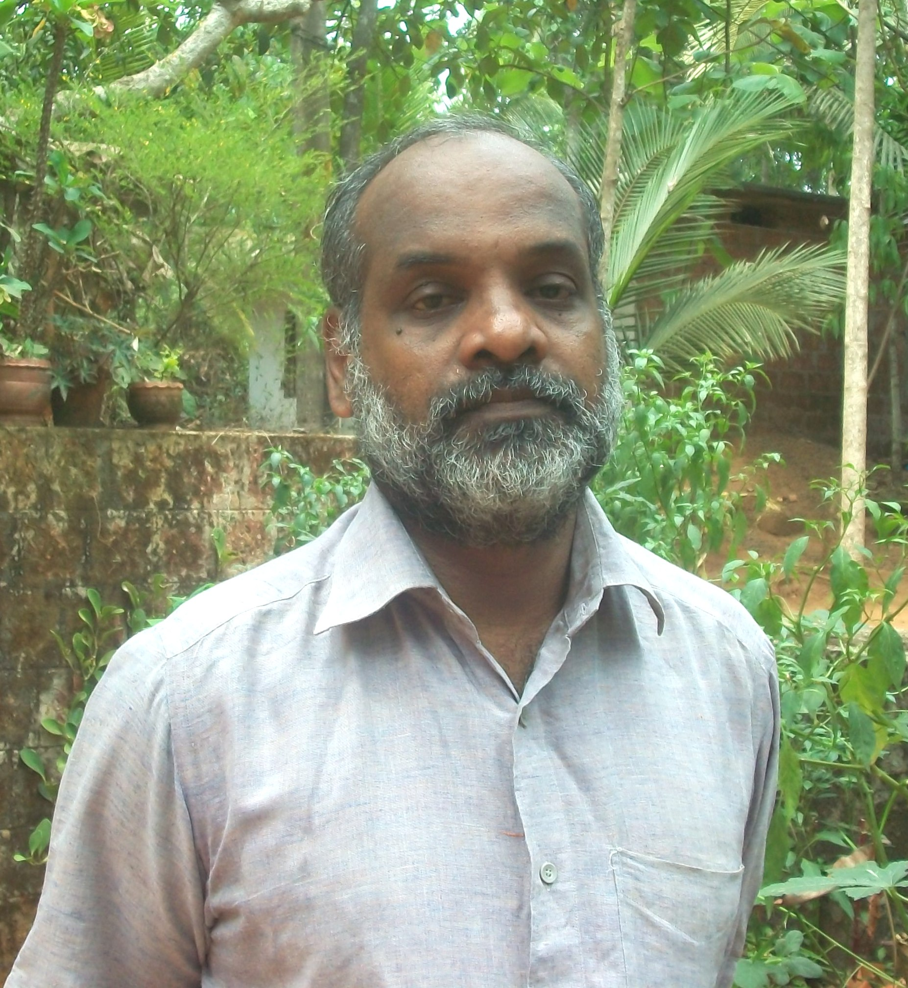 സാഹിത്യകാരൻ പി.സുരേന്ദ്രൻ